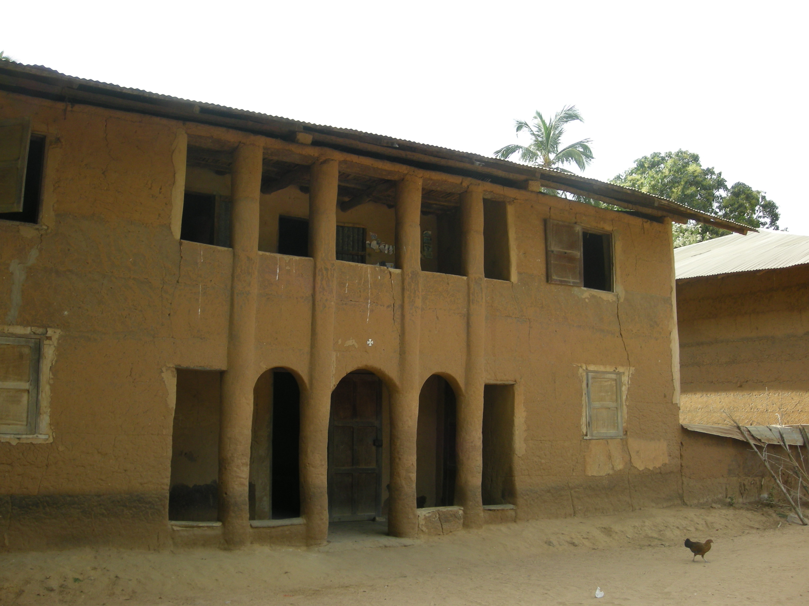 Case à étages en banco à Mlomp (Casamance, Sénégal)